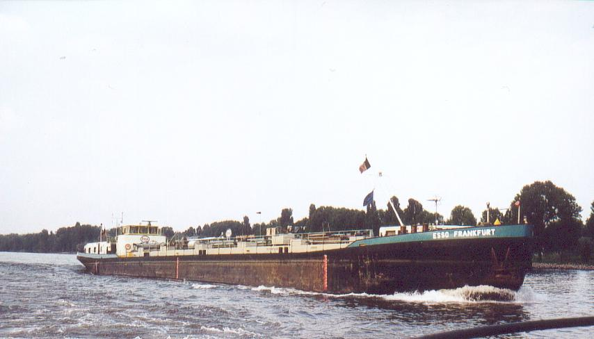 Binnentanker Esso Frankfurt, ENI 04302500 Eigene Aufnahme, F.Lang, GDFL